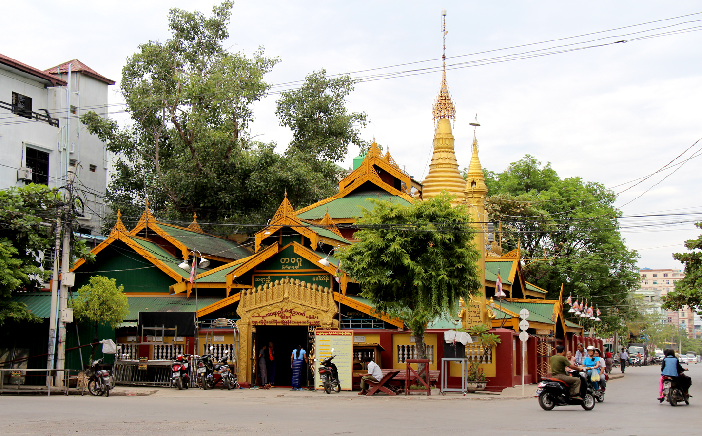 မြန်မာဘာသာ: တဝဂူဘုရား (မန္တလေး) ၈၂-လမ်း၊ လမ်း-၂၀ ထောင့်၊ ပုလဲငွေရောင် အရပ်